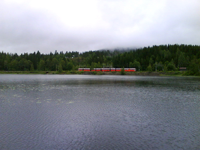 Movatn stasjon med tog, og Søndre Movatn sett fra østsiden av vannet.